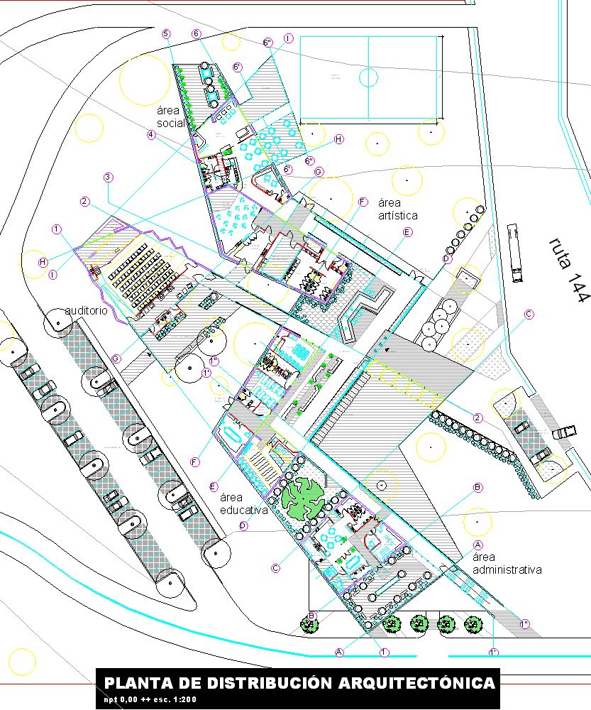 ejemplo de una planta arquitectónica elaborada con ayuda de programas CAD (diseño asistido por computadora).